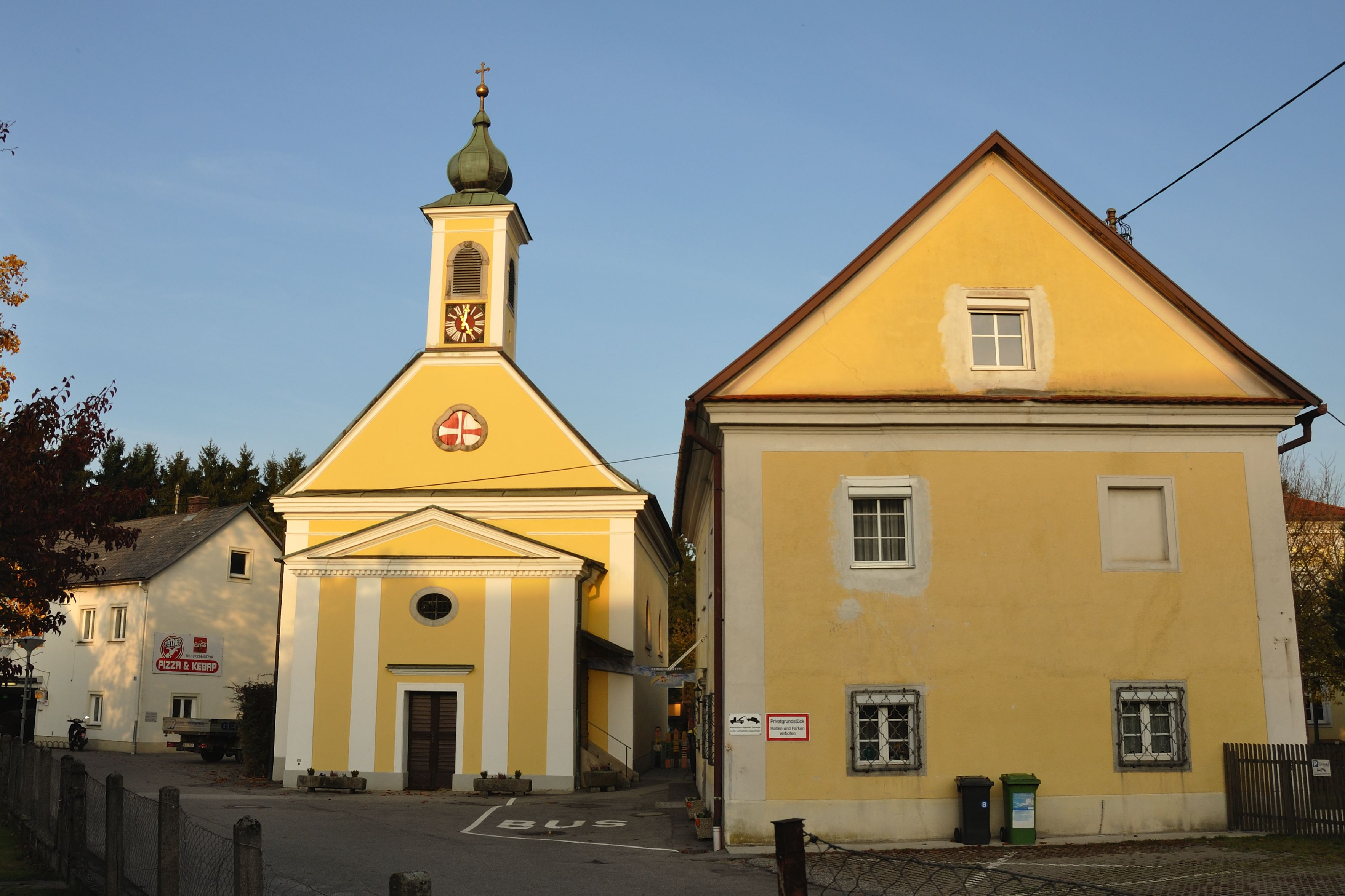 Kath. Pfarrkirche hl. Jakob